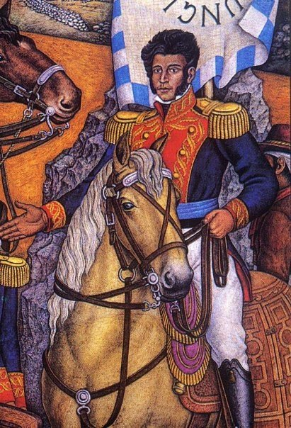 Óleo de Ramón Sagredo, 1865. Imagen tomada de: Florescano, Enrique y Rojas, Rafael. “En pie de guerra” en La antorcha encendida, comp. Fausto Zerón-Medina, Clío, México, 1996, p. 40.